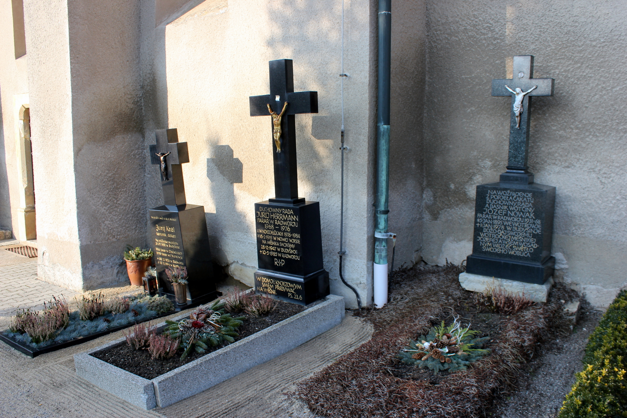 Hornjoserbsce: Radwor; rowy Jurja Krala, Jurja Herrmanna a Józefa Nowaka na kěrchowje.